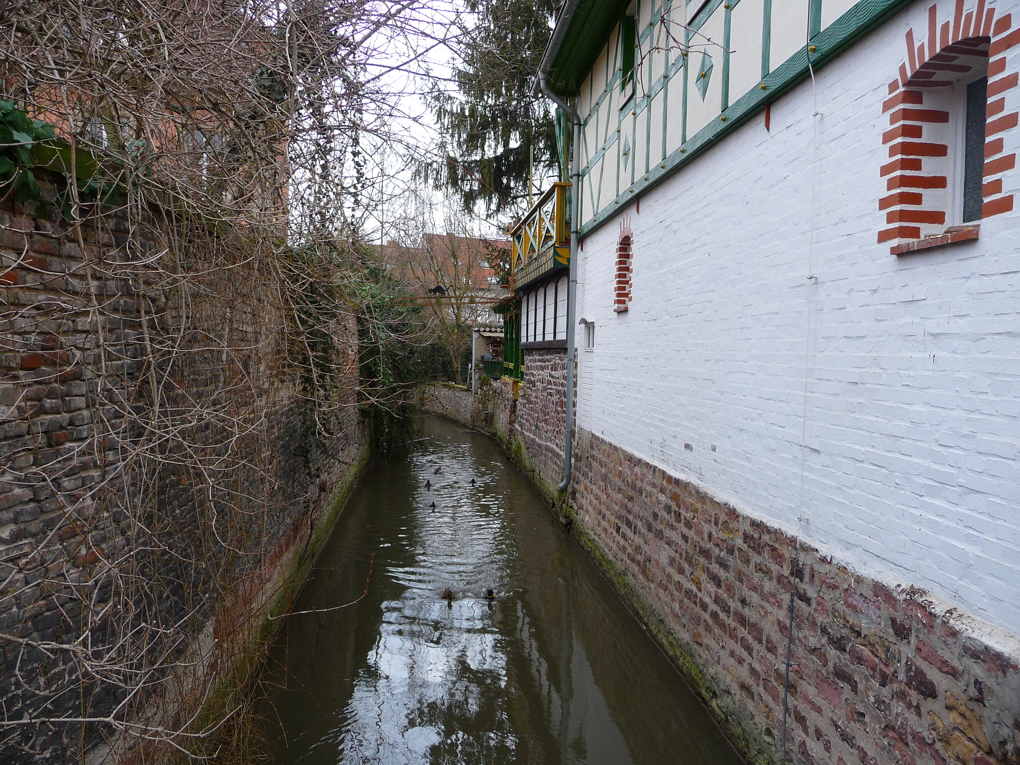 Blick auf den Leimbach in Schwetzingen, in der Nähe des Schwetzinger Schlosses / Amtsgericht